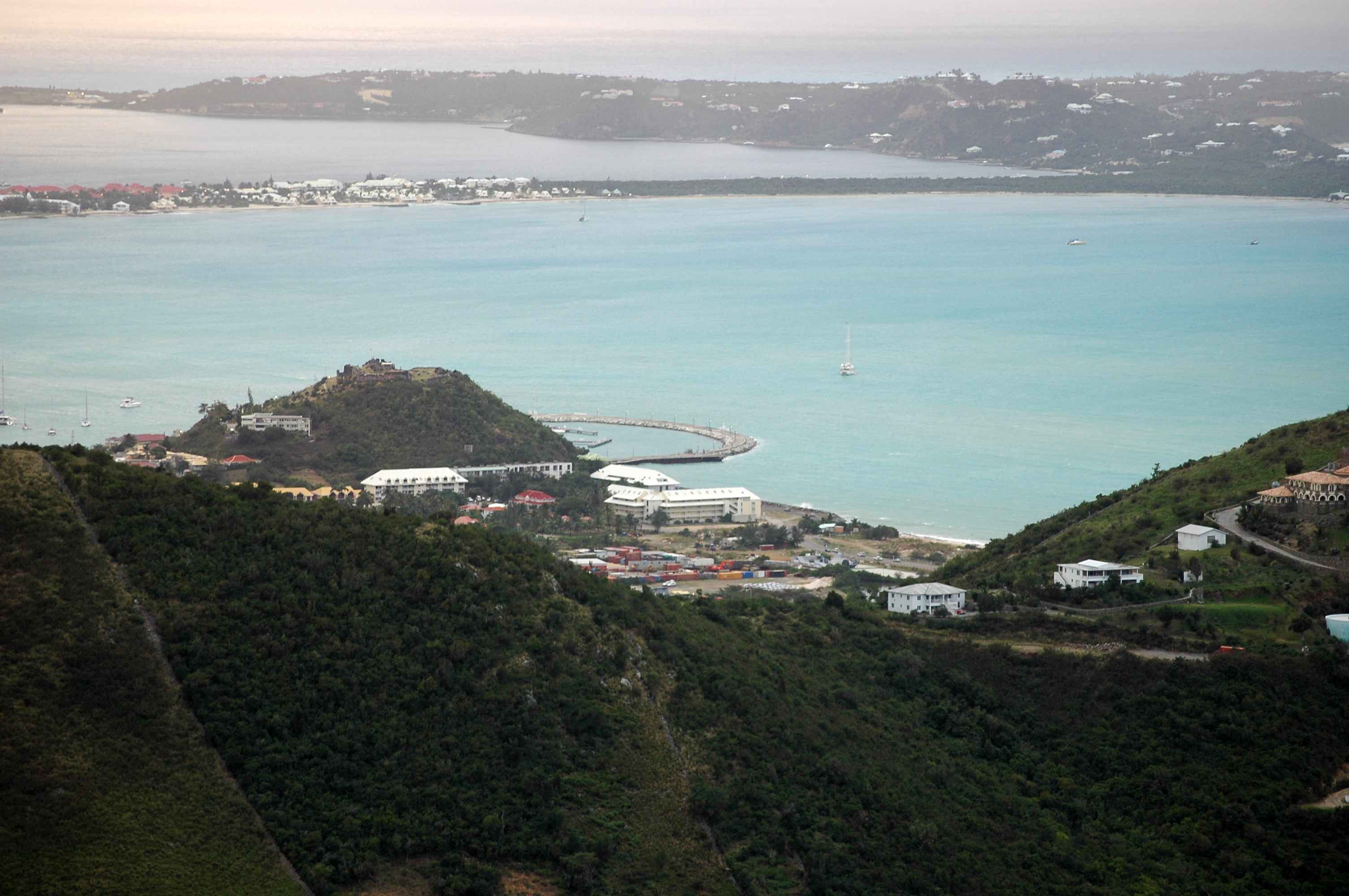 Galisbay view